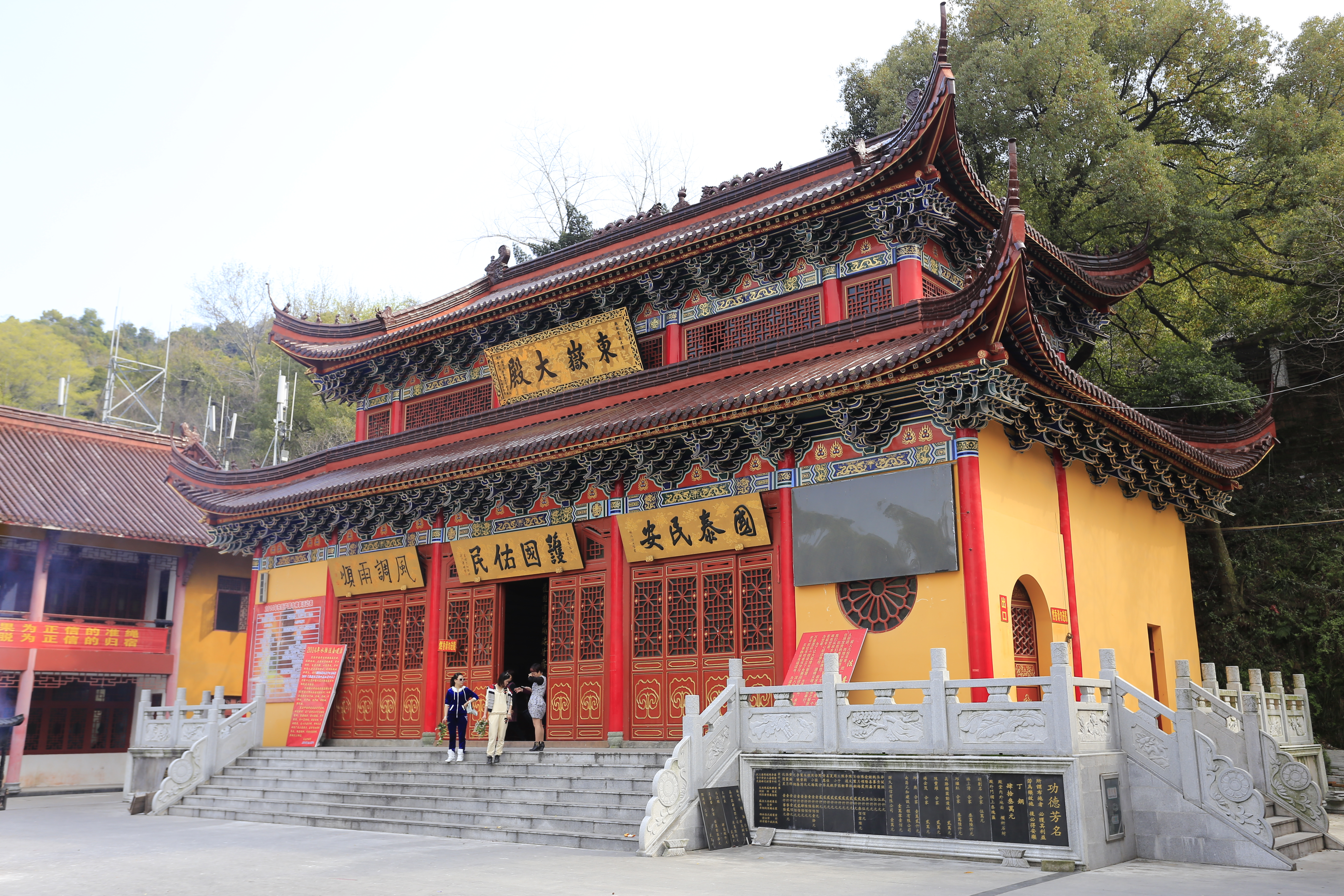 上饶东岳庙